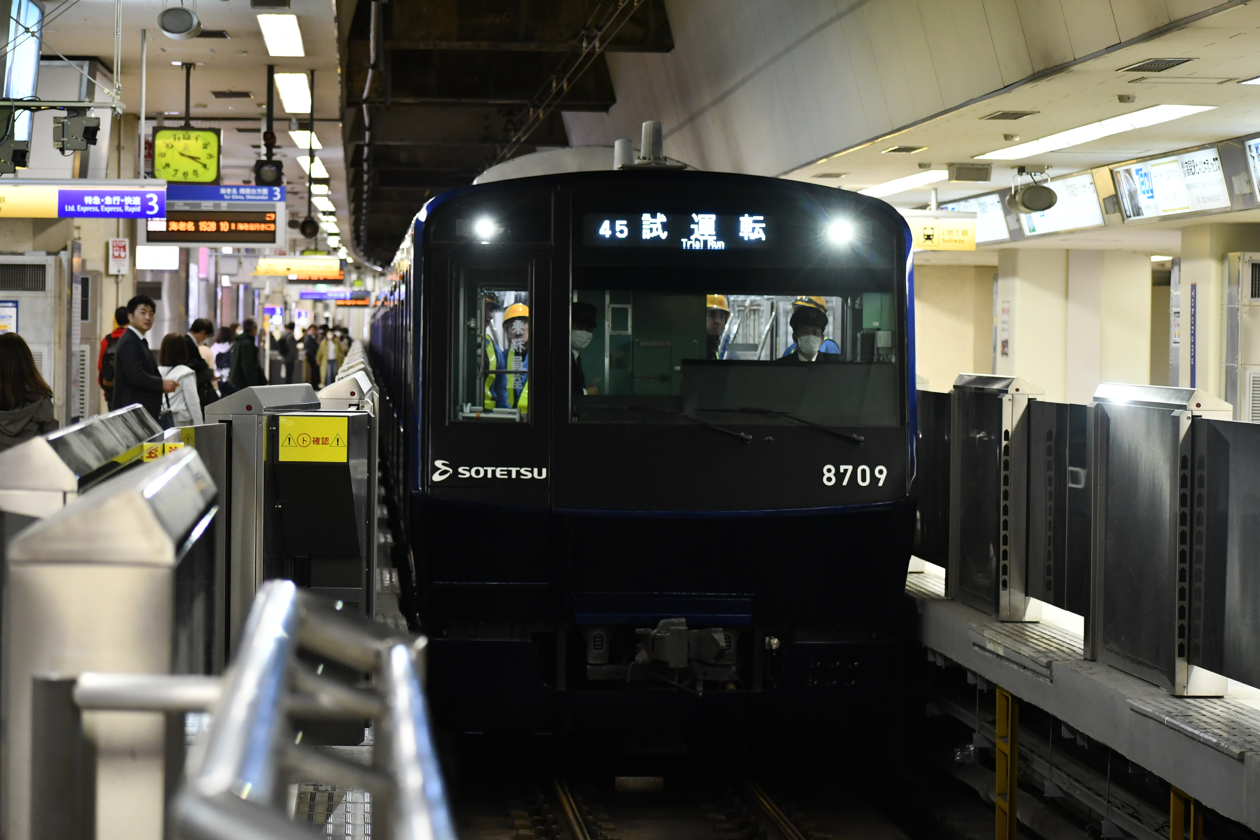 リニューアル明け試運転で横浜駅に入線した8709F。